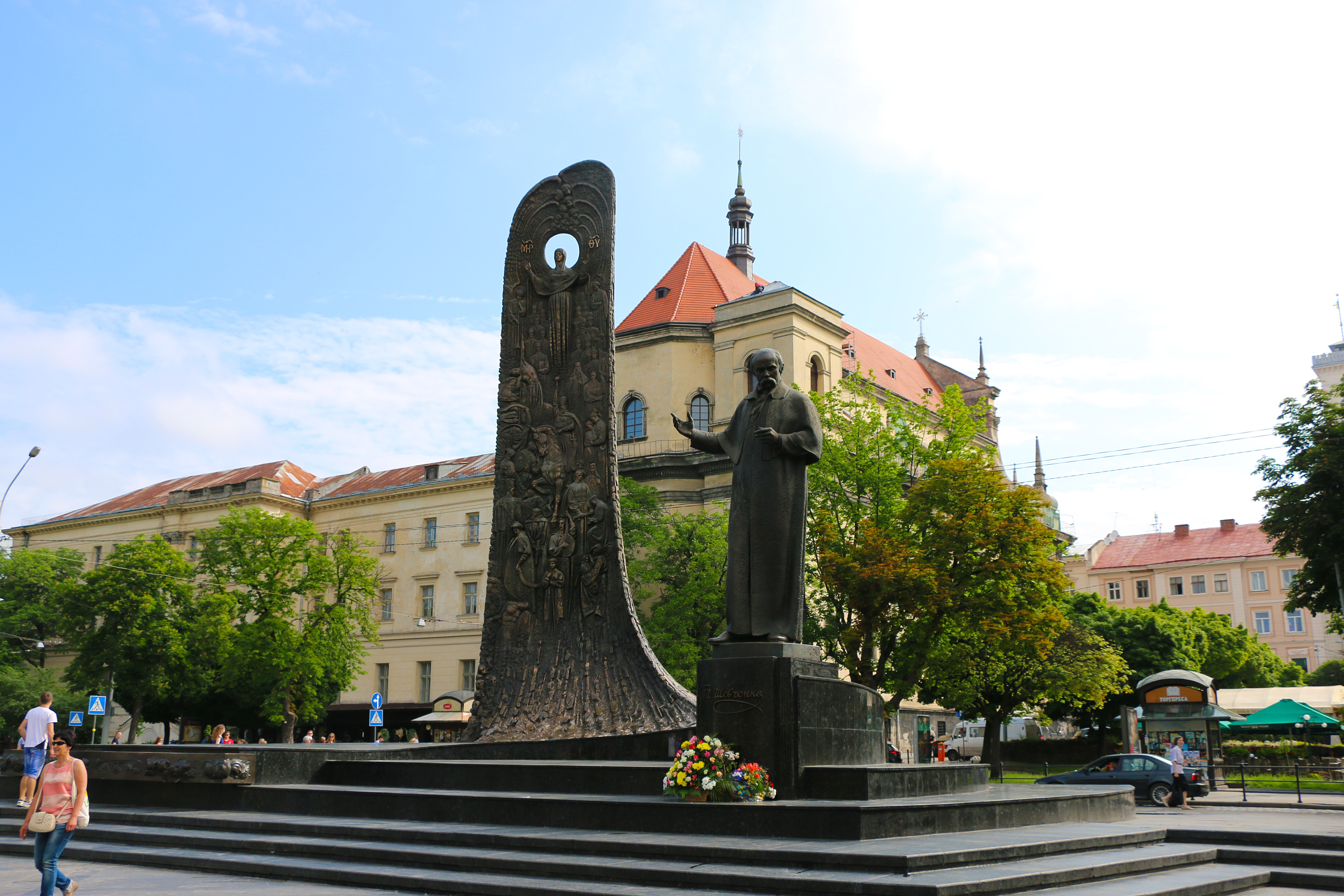 Пам'ятник Шевченку Т. Г., українському поету і художнику, Львів, пр. Свободи